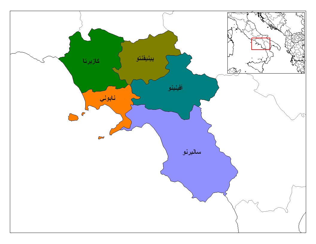 مقاطعات كامبانيا